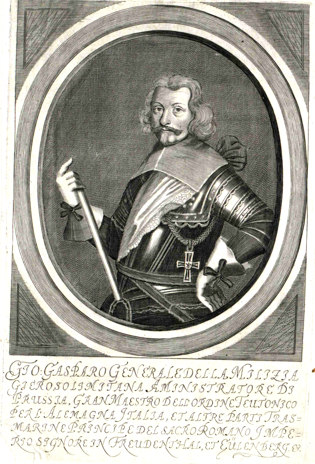 Johann Caspar von Ampringen, magyar forrásokban báró Ampringen János Gáspár (1619. március 20. (v.19.) –Boroszló, 1684. szeptember 9.) a Német Lovagrend 48. nagymestere, a Magyar Királyság császári kormányzója.